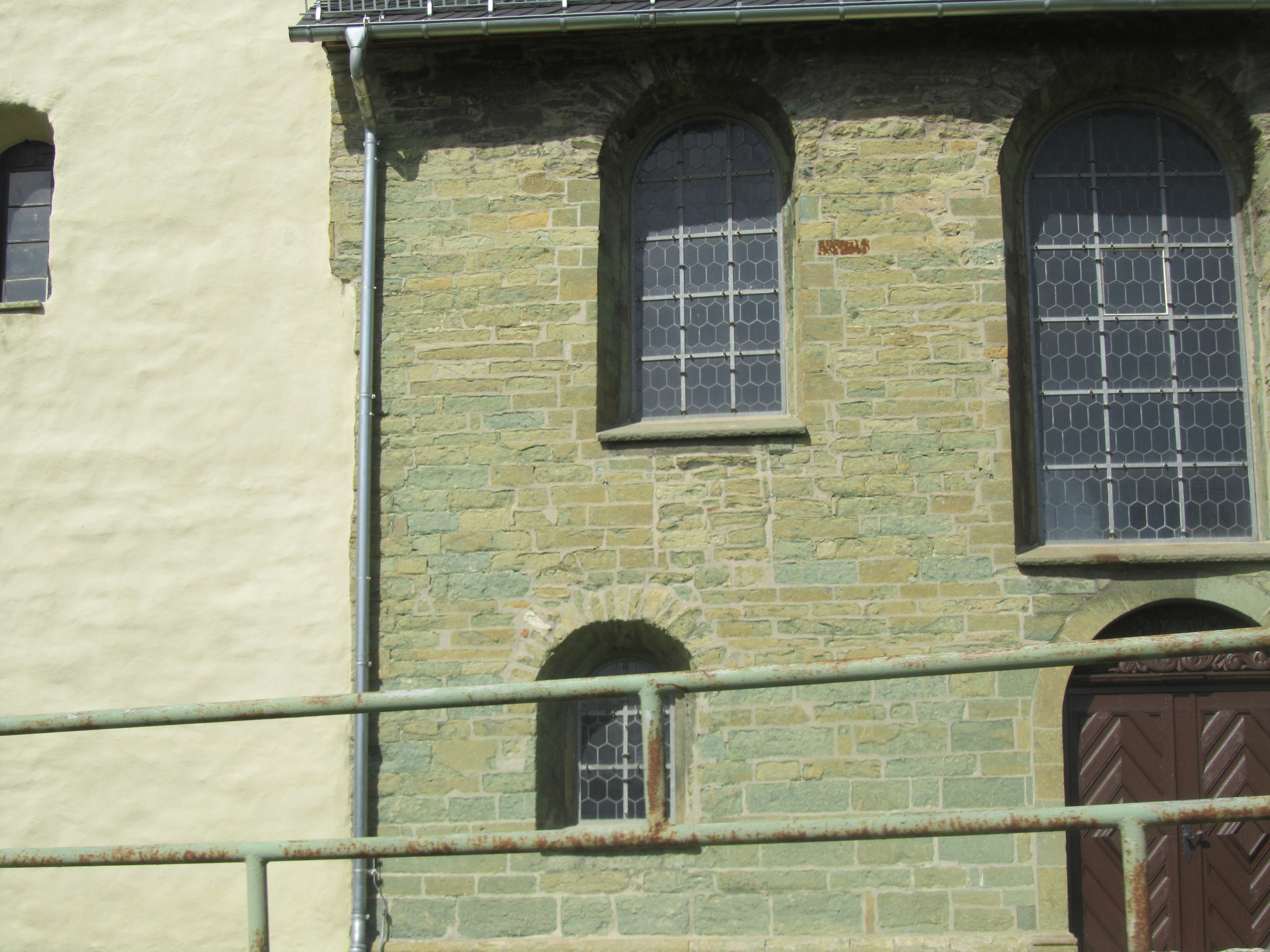 Schwefe, Gemeinde Welver, Ortsbild, Romanische Elemente in Grünsandstein am Kirchenschif von St. Severin (von Südost)